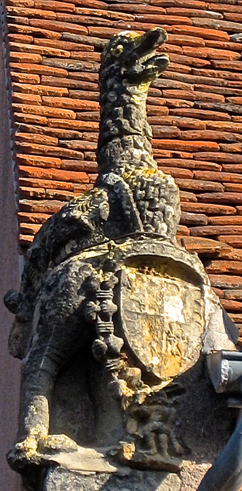 Acrotère d'une des chapelles latérales, en remploi dans la façade d'une maison, rue de la Promenade, en face de la mairie. Représentation d'une grue, portant un écusson aux armoiries de Jean d'Albret, seigneur de Châteaumeillant, surmonté de la couronne comtale ; collier de l'ordre de Saint-Michel entourant l'écusson.